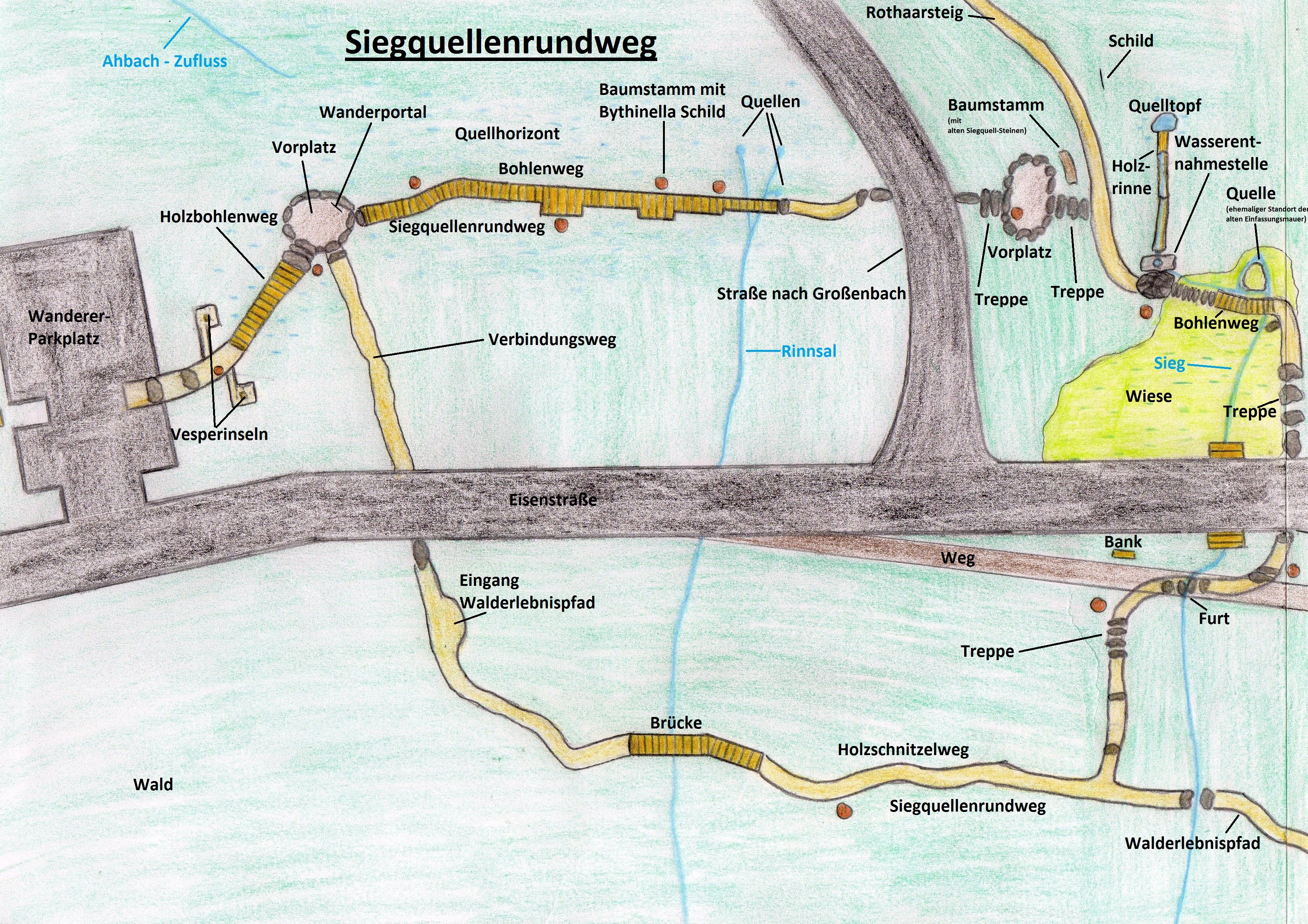 Grobe selbst gezeichnete Karte des Siegquellenrundwegs im Siegquellgebiet